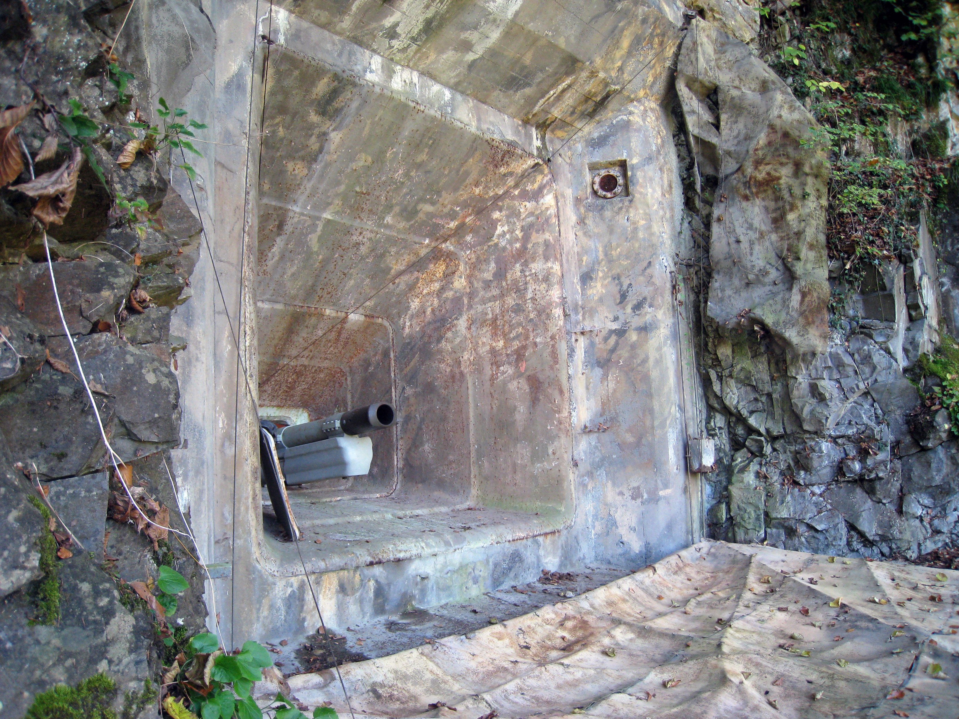 Haubitze "Balthasar" der Festung Niederberg ob Näfels